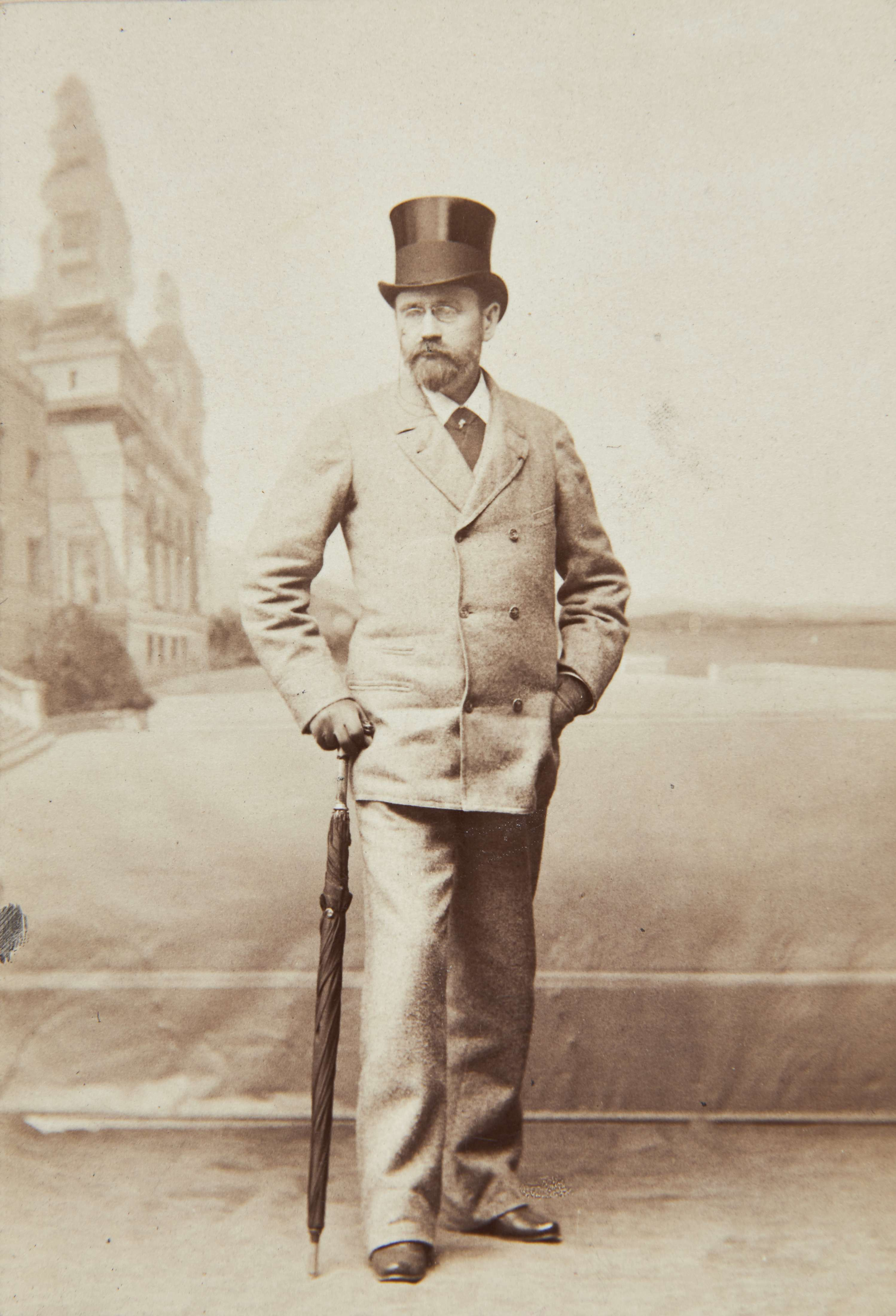 Portrait d'Émile Zola. Ancienne collection François Émile-Zola.